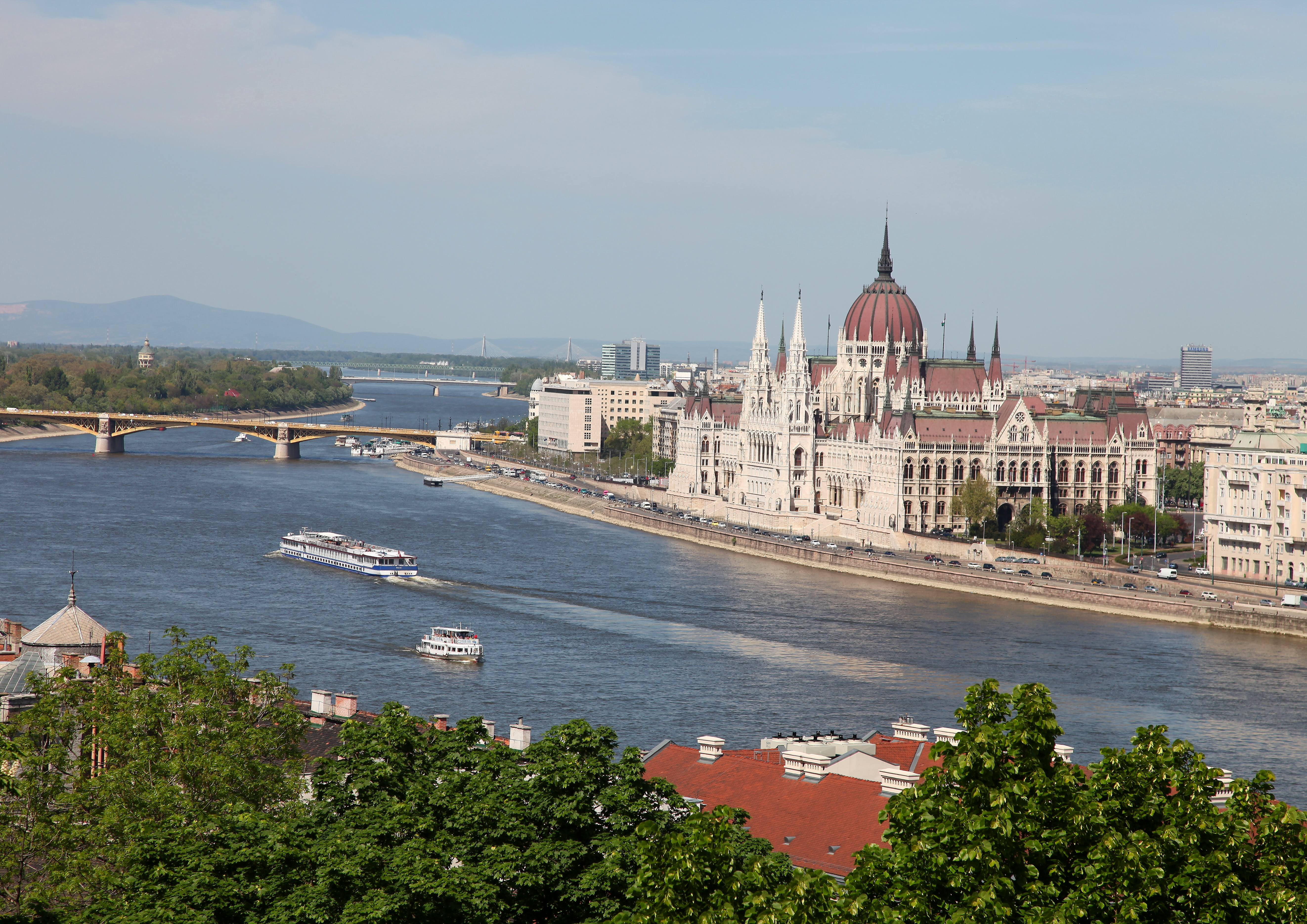 Budapest, Hungary